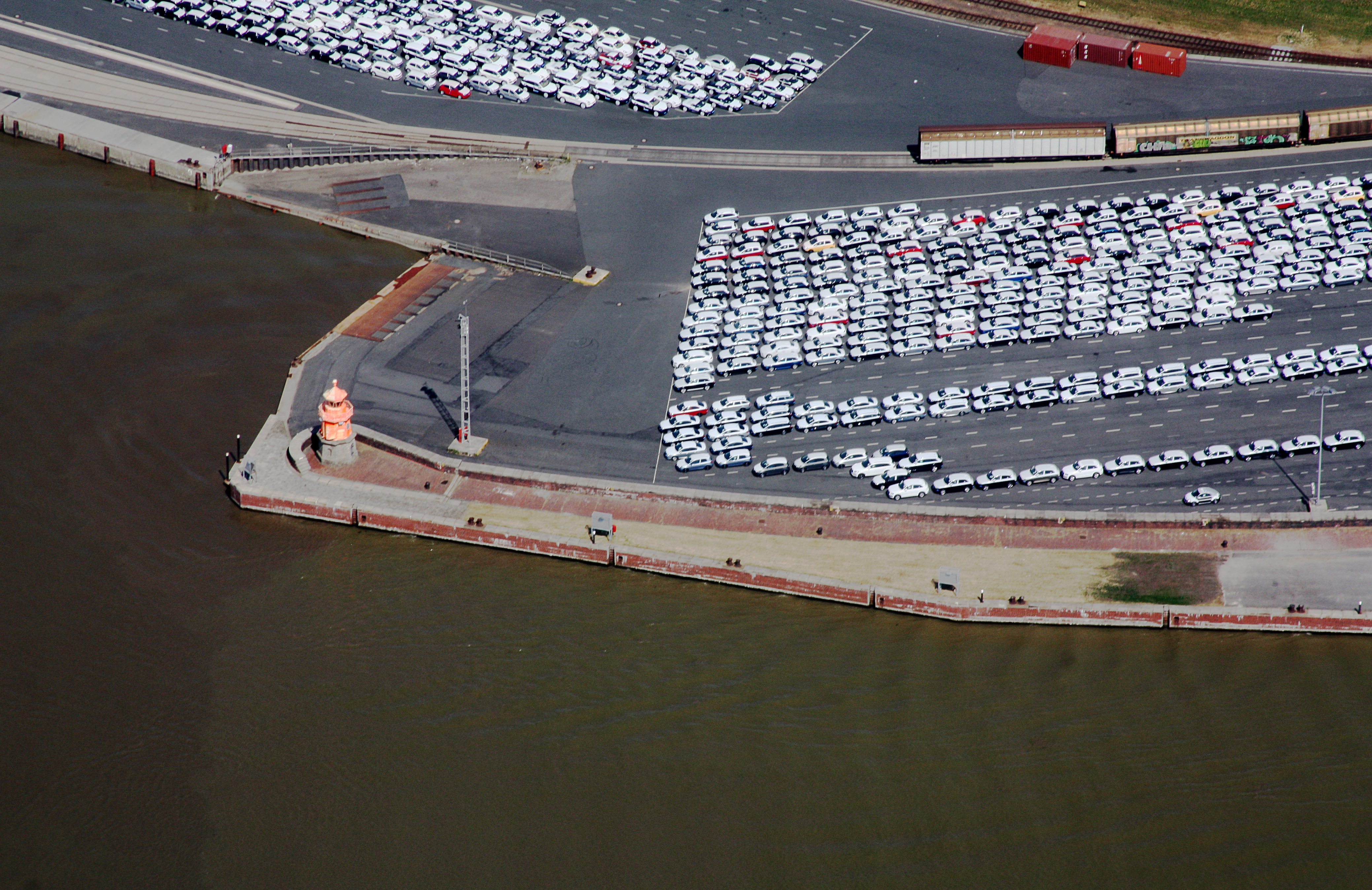 Flug über Emden; Flughöhe 1500 ft; Juli 2010; Originalfoto bearbeitet: Tonwertkorrektur und Bild geschärft mit Hochpassfilter